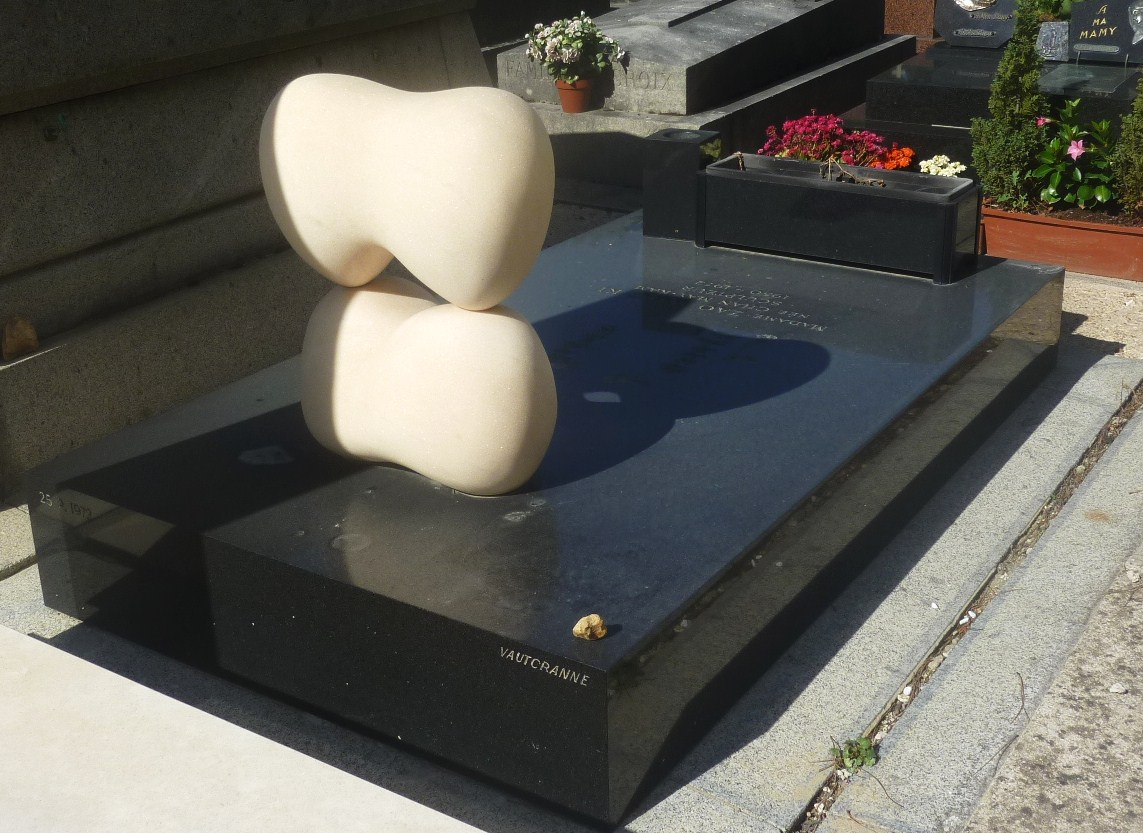 Tombe au cimetière Montparnasse (Paris) de la deuxième épouse du peintre français d'origine chinoise Zao Wou-Ki